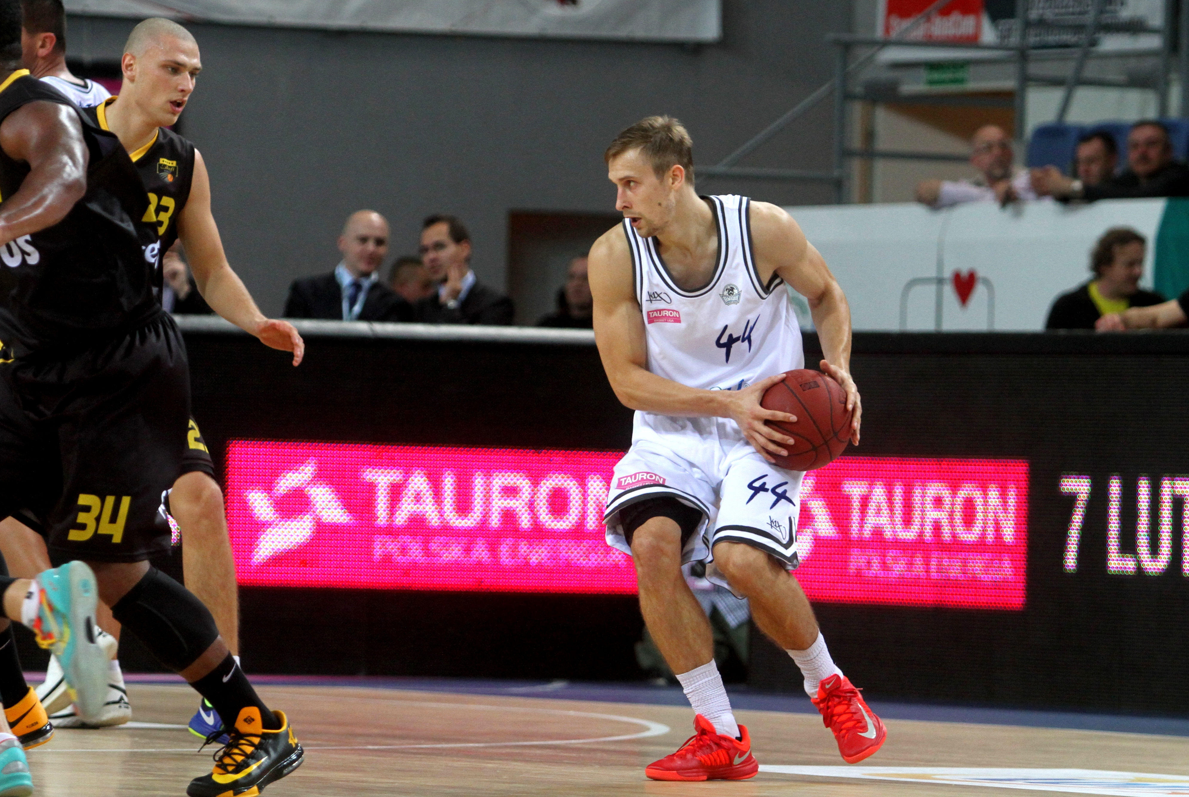 Deividas Dulkys, Anwil Włocławek